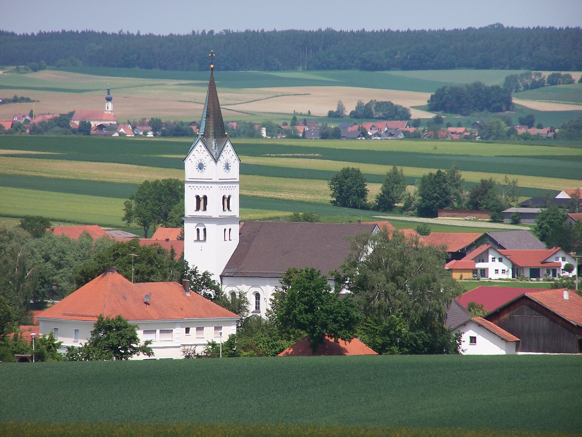 Laberweinting, Hofkirchen 77, Pfarrkirche St. Peter. Ansicht von südosten in der Nähe der Bergmaiergrotte. Im Hintergrund Grafentraubach mit Kirche St. Pankratius.